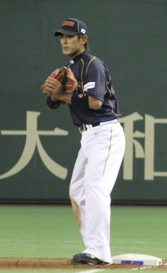 Atsunori Inaba